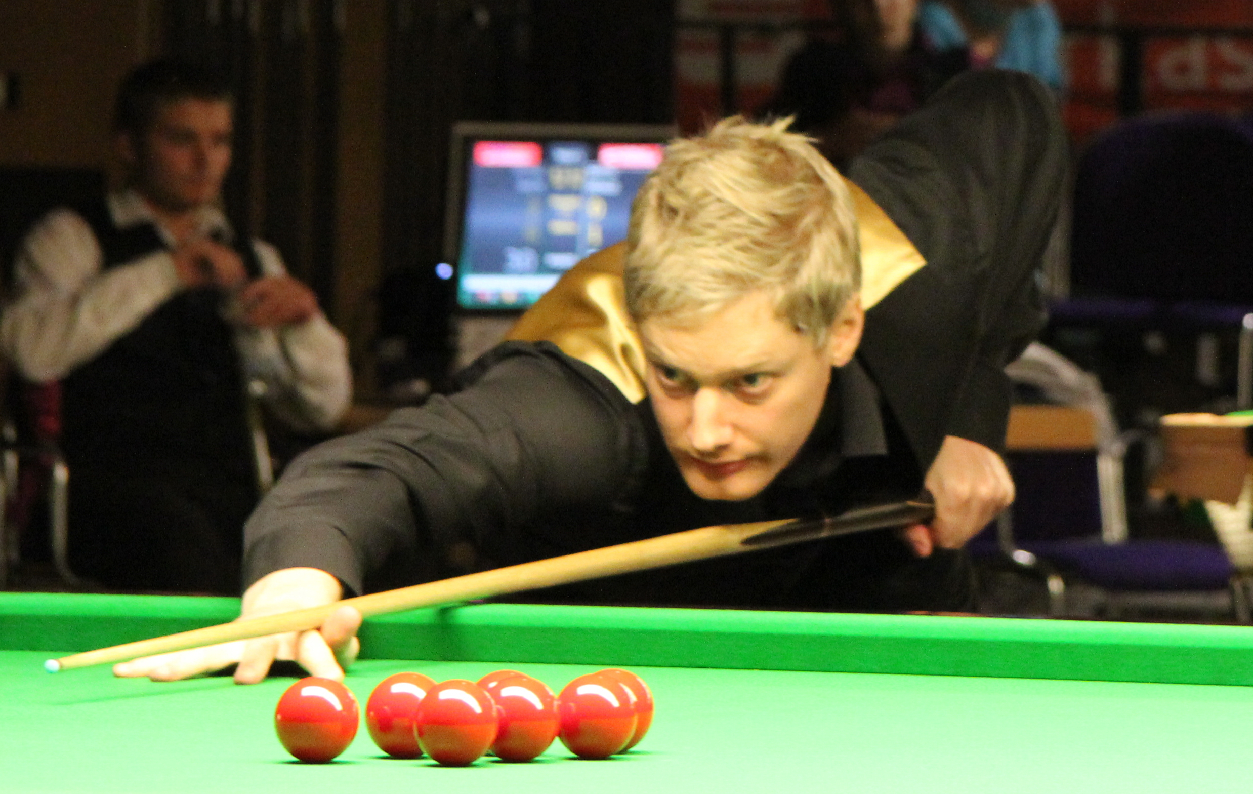 Neil Robertson beim Paul Hunter Classic 2011